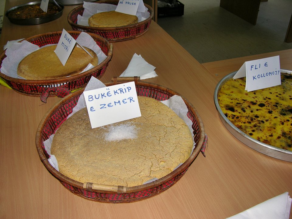 Gatime te bukes se misrit dhe pogaçes tipike te zones se Hasit